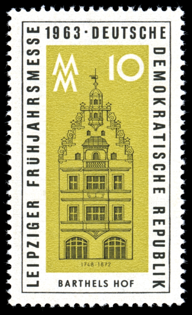 Information: Ausgabepreis: Pfennig First Day of Issue / Erstausgabetag: Auflage: Entwurf: Druckverfahren: Michel-Katalog-Nr: Ländercode-MiNr